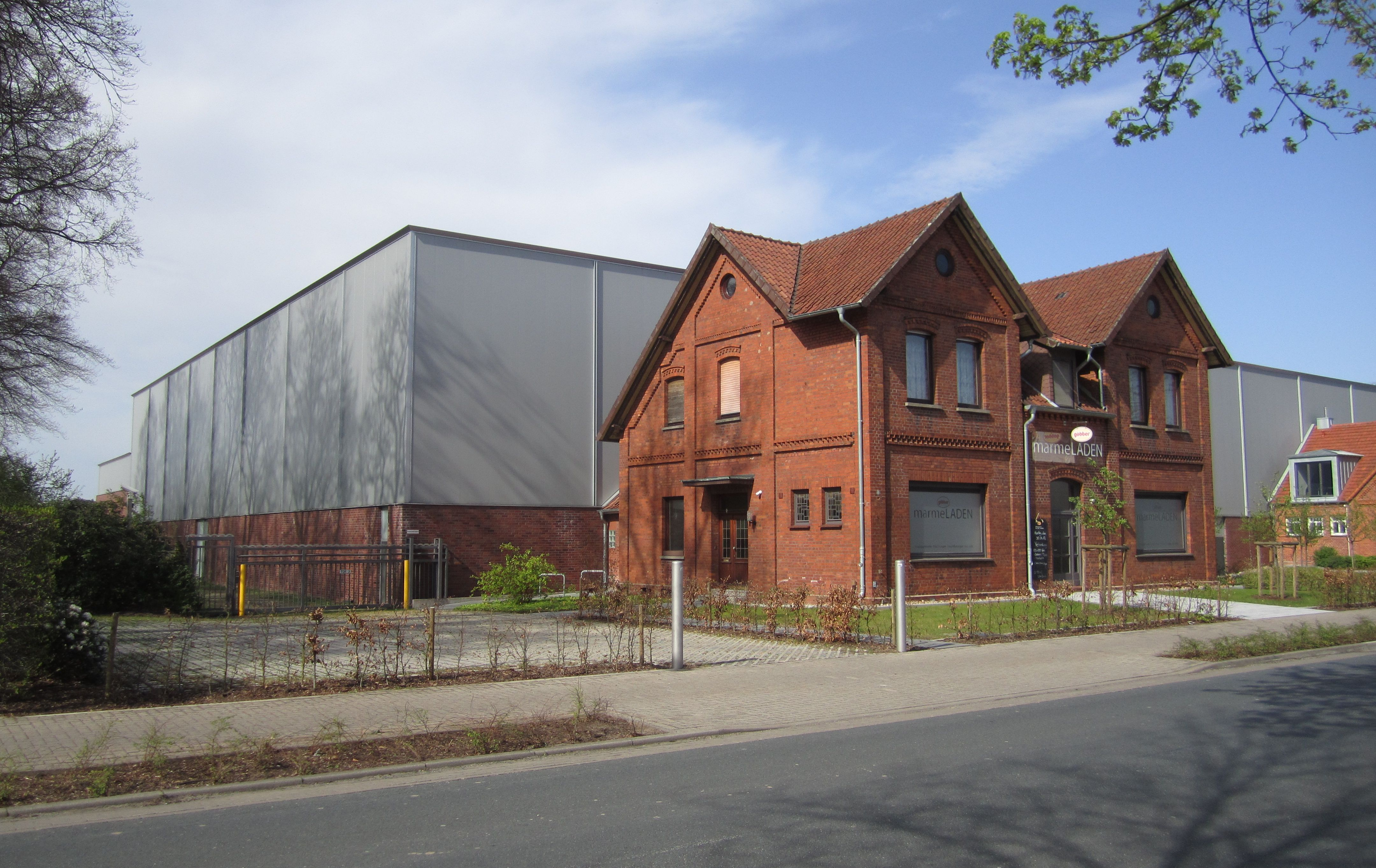 Werksverkauf-Laden der Marmeladenfabrik Göbber in Eystrup, Niedersachsen.